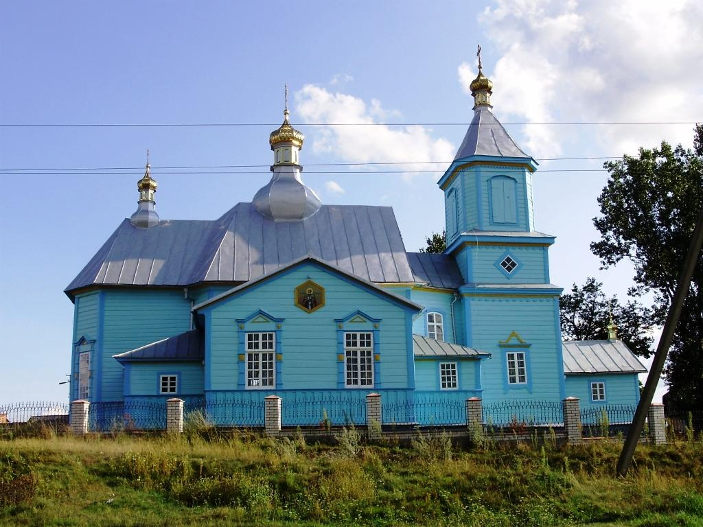 Свято-Казанська церква с. Піща: Свято-Казанська церква с. Піща